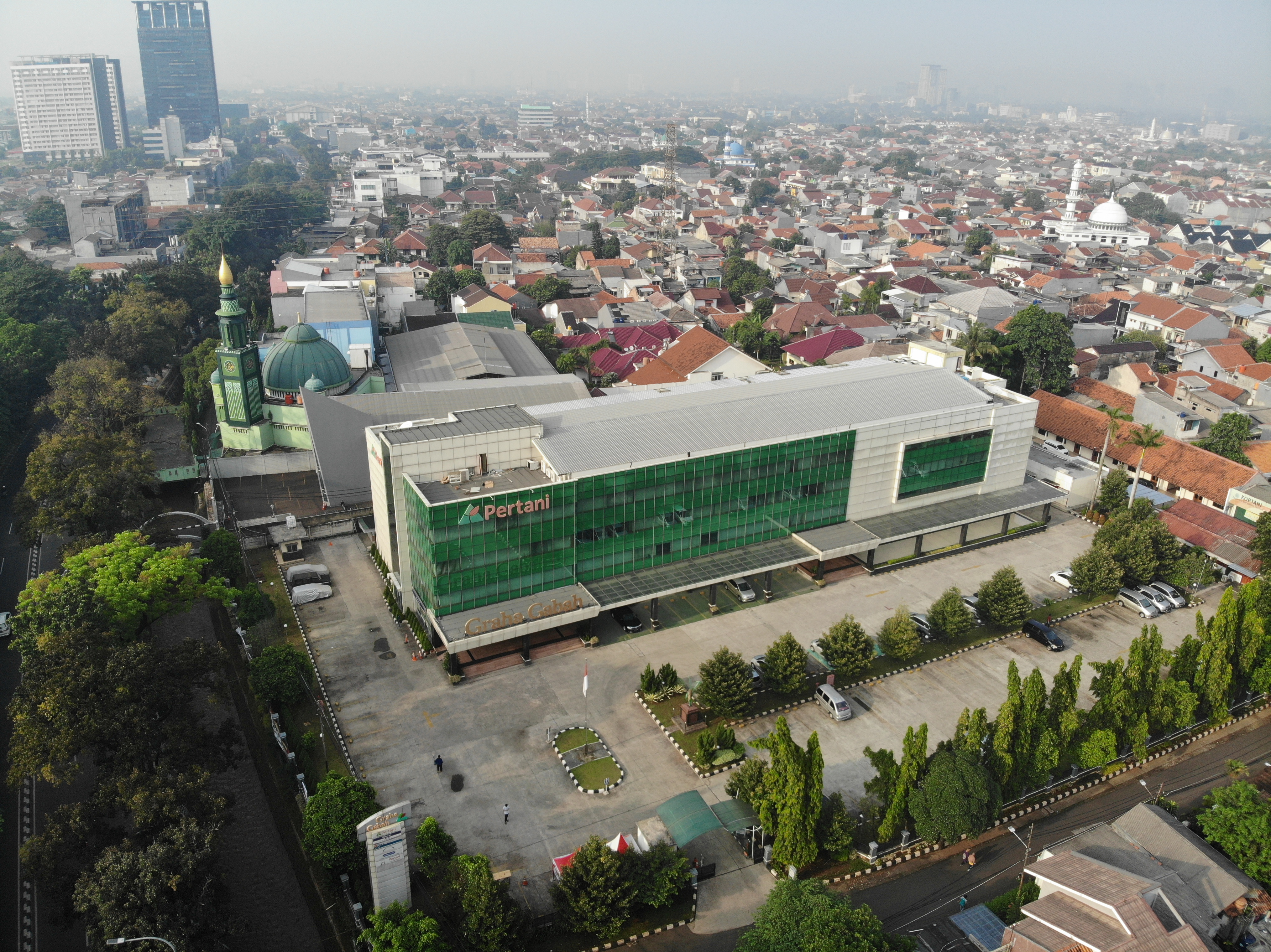 Kantor Pusat Jakarta Selatan PT Pertani (Persero)